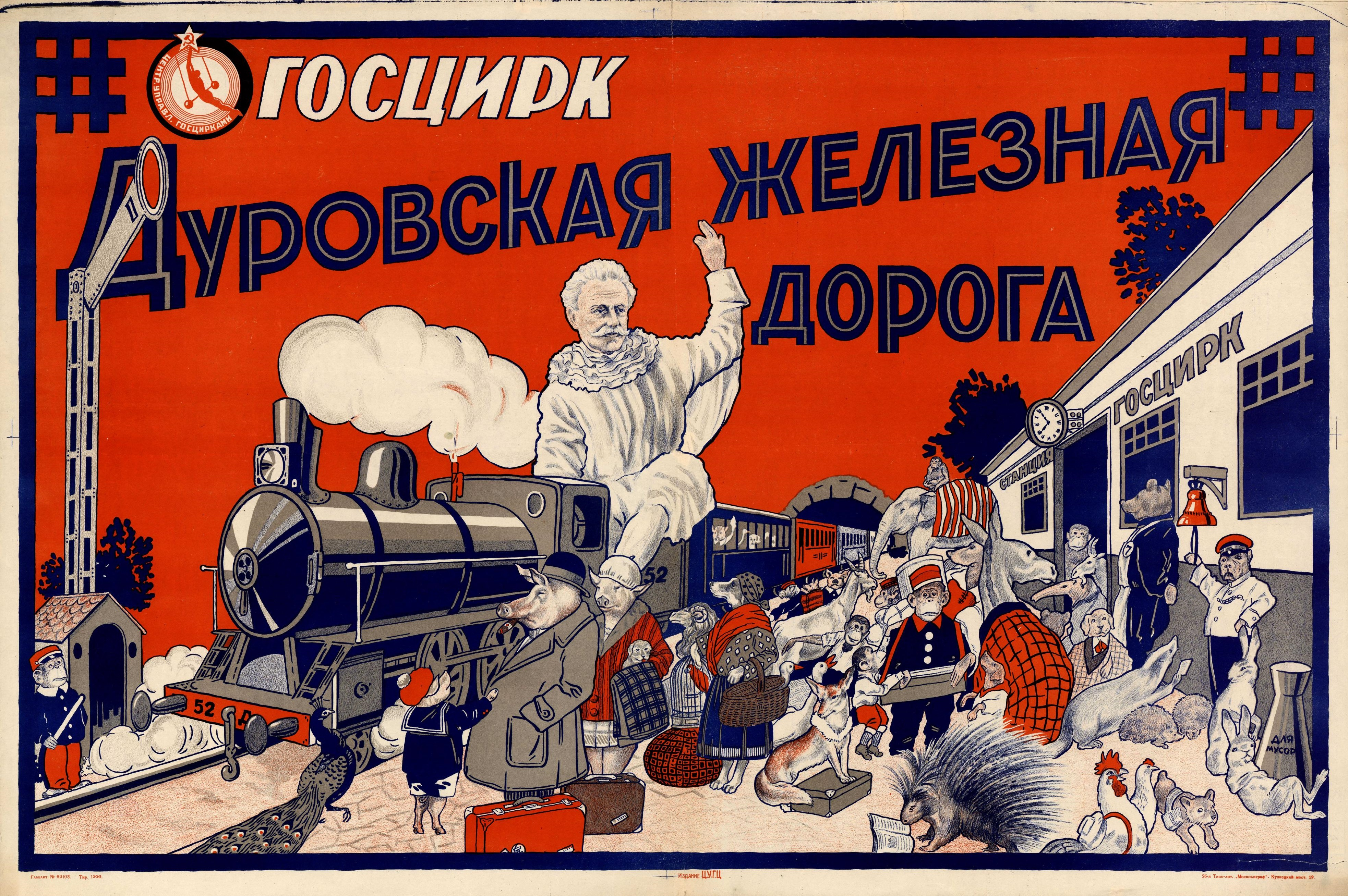 Цирковая афиша «Госцирк. Дуровская железная дорога». Москва: Издание ЦУГЦ (Центральное управление госцирками). Хромолитография; 74×108 см. Тираж 1500 экз.